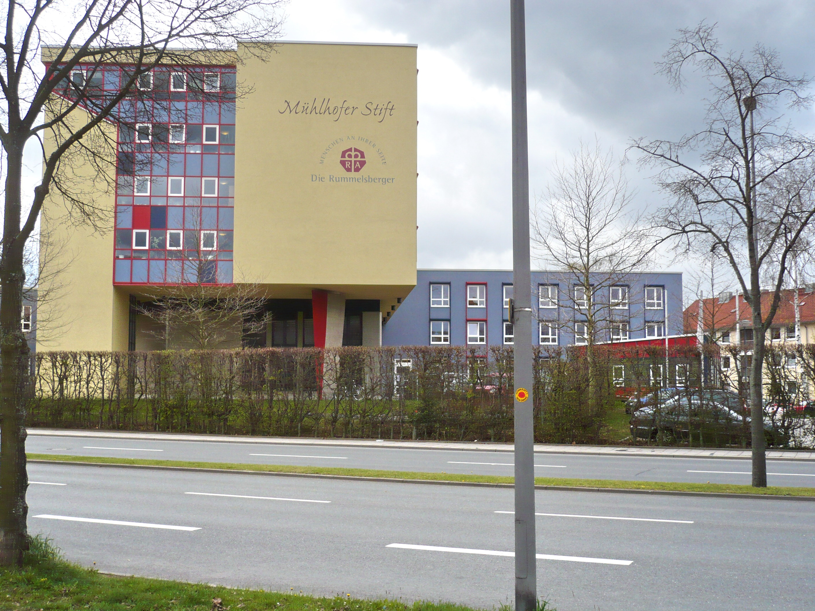 Bayreuth, Mühlhofer Stift, Schellingstr. 19